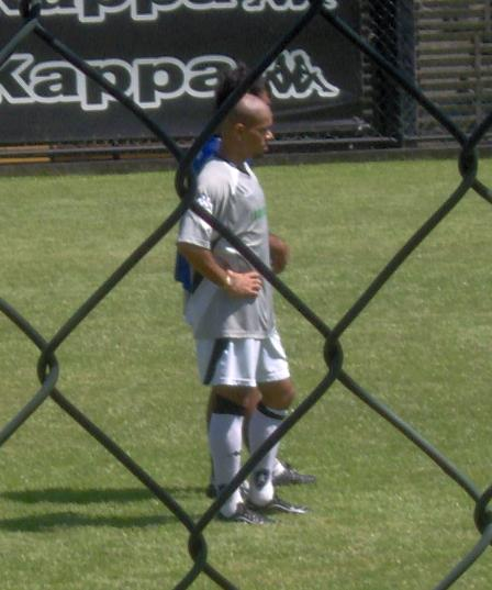 Alessandro (Alessandro da Conceição Pinto), lateral-direito brasileiro, treinando pelo Botafogo, do Brasil.